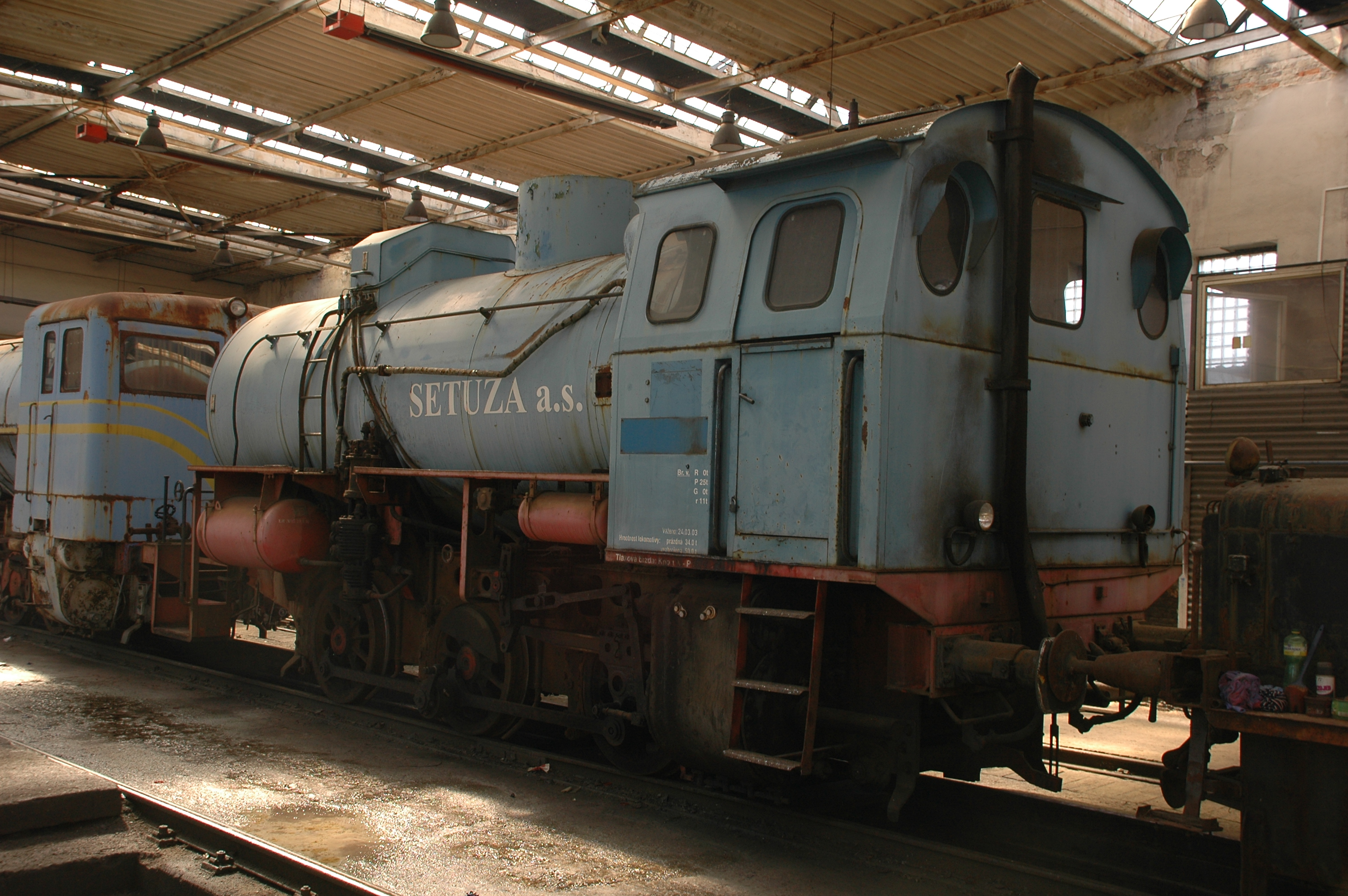 Parní akumulační lokomotiva ze Setuzy v majetku KPKV